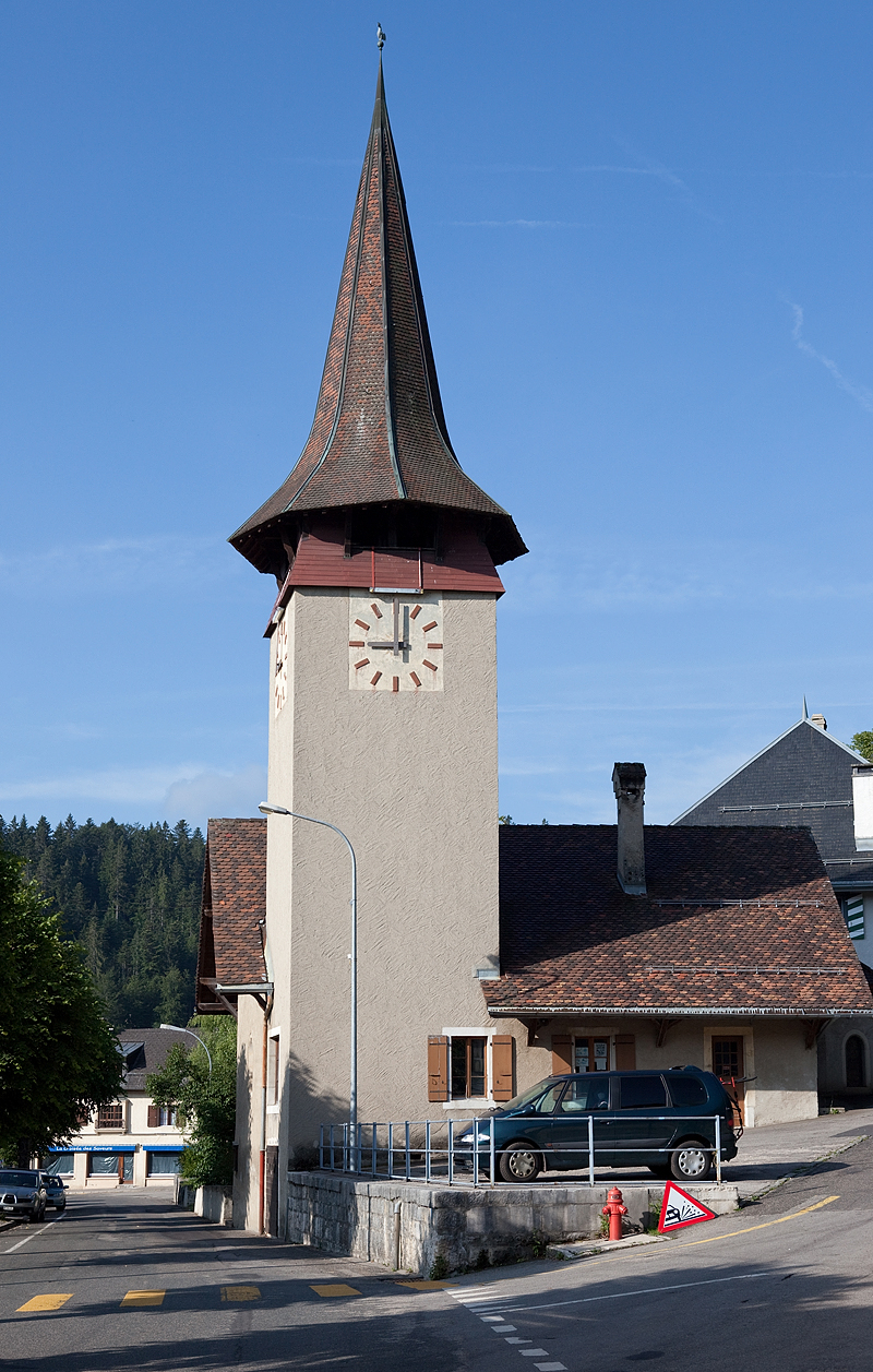 L'église du Saint-Cergue